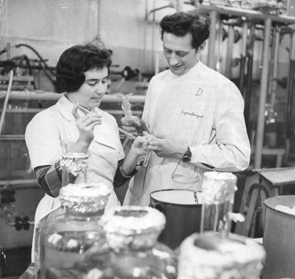 Zentralbild-Löwe-Me-Noa-5.2.1960 Jugendbrigade "Alexander Fleming" in Dresden arbeitet vorbildlich.In der Abteilung Antibiotica im Arzneimittelwerk Dresden kämpfen heute 157 Kolleginnen und Kollegen dieser Abtielung um den Ehrentitel Produktonsabschnitt der sozialistischen Arbeit.Mit großem Plan gehen ihnen dabei die 13 Mitglieder der Jugendbrigade "Alexander Fleming" voran,die sich 1957 zusammenfand,im Frühjahr 1959 als "Hervorragende Jugendbrigade der DDR" ausgezeichnet wurde und dier am 10.Jahrestag der DDR mit dem Staatstitel "Brigade der sozialistischen Arbeit" geehrt wurde.Ubz: Die Brigadierin Inge Winkler und Brigademitglied Joachim Vetter messen den PH-Wert bei der Herstellung von Penicillin."